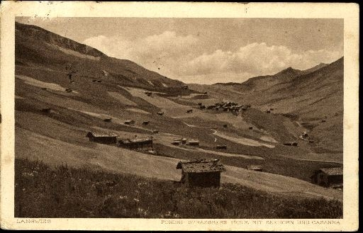 Langwies-Fondei mit Durannapass und Seehorn, Ansichtskarte